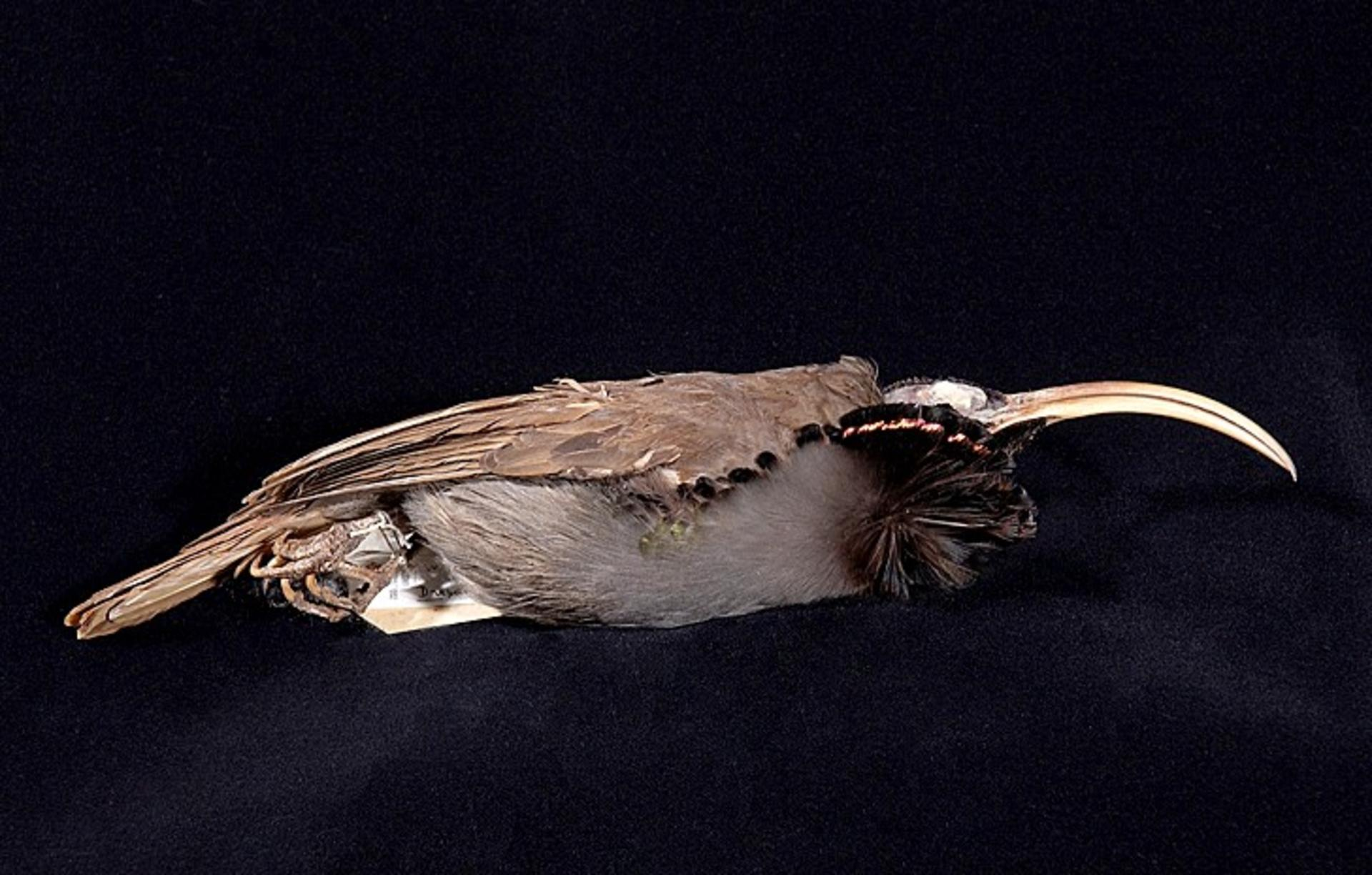 Drepanornis bruijnii Oustalet, 1880